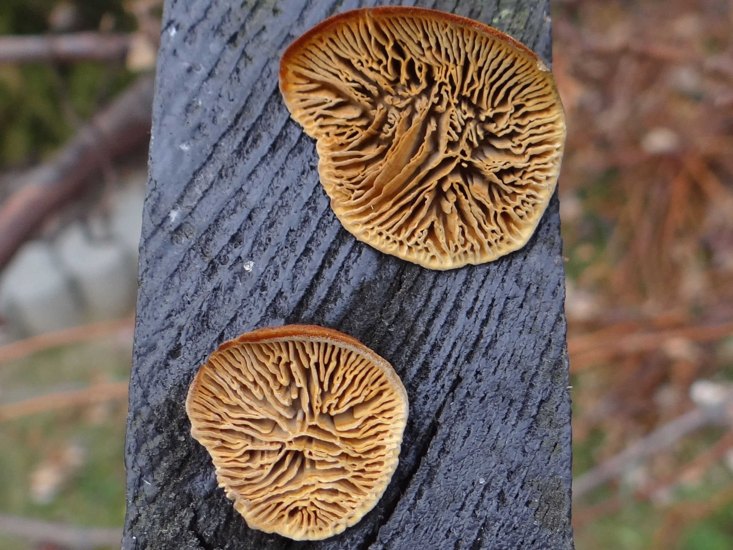 Gloelophyllum sepiarium